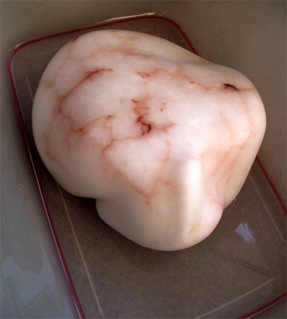 zeitgenössische alabasterskulptur